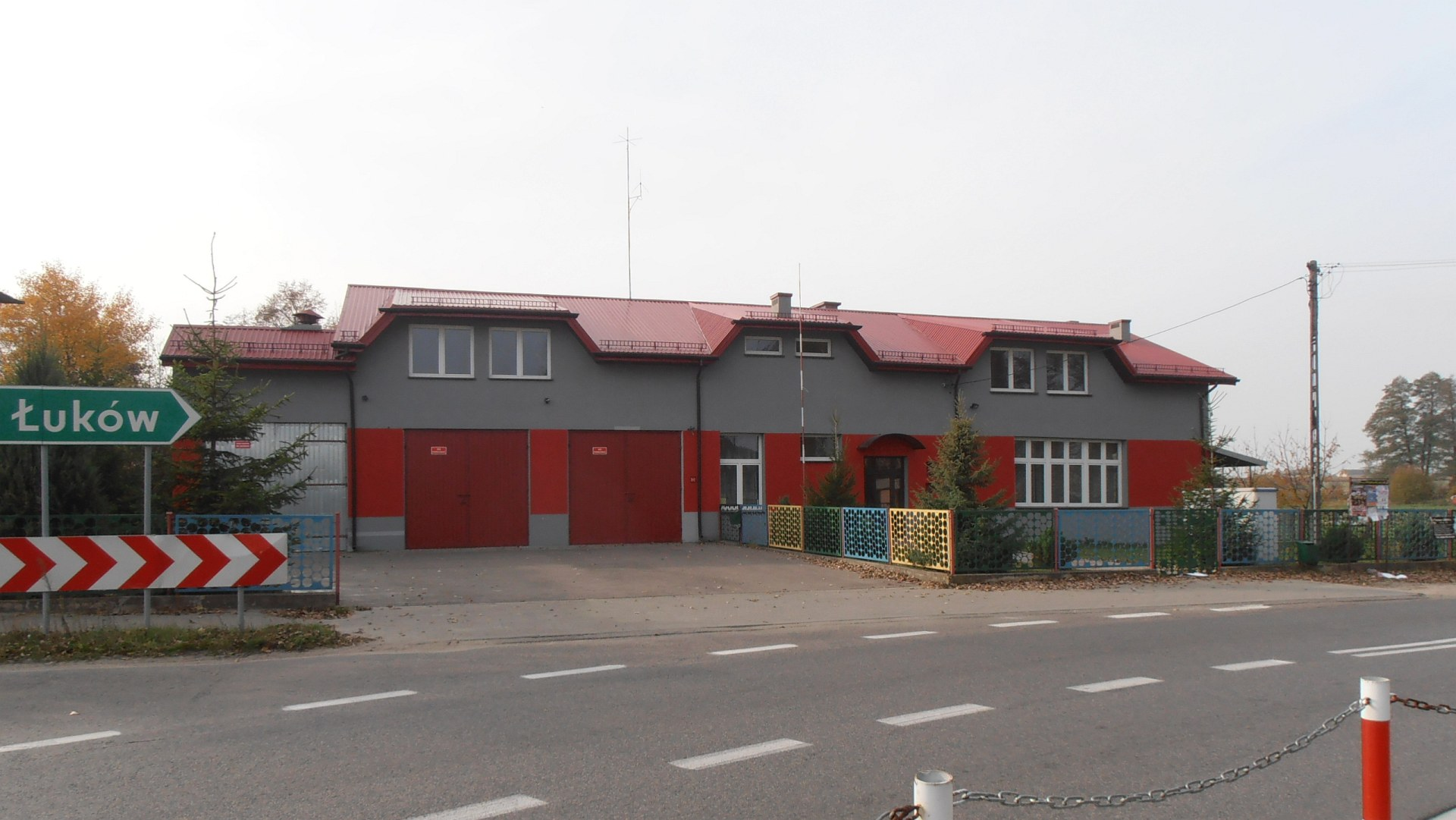 Remiza Ochotniczej Straży Pożarnej w Serokomli (pow. łukowski, woj. lubelskie, Polska).